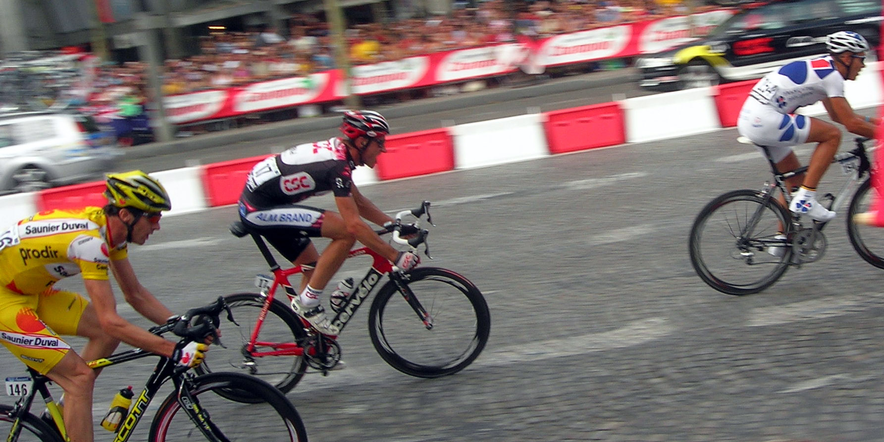 Tour de France 2006 - final stage on Champs Élysées. David Millar, Jens Voigt and Philippe Gilbert.